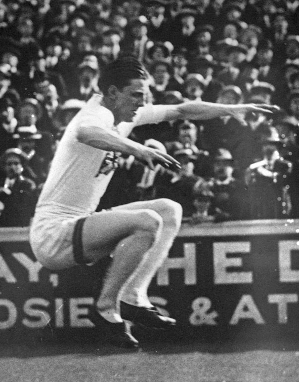 [4 juillet 1914], Championnats amateurs [sur le terrain londonien de Stamford Bridge] P. C. Kingsford, gagnant du saut en longueur : [photographie de presse] / [Agence Rol]